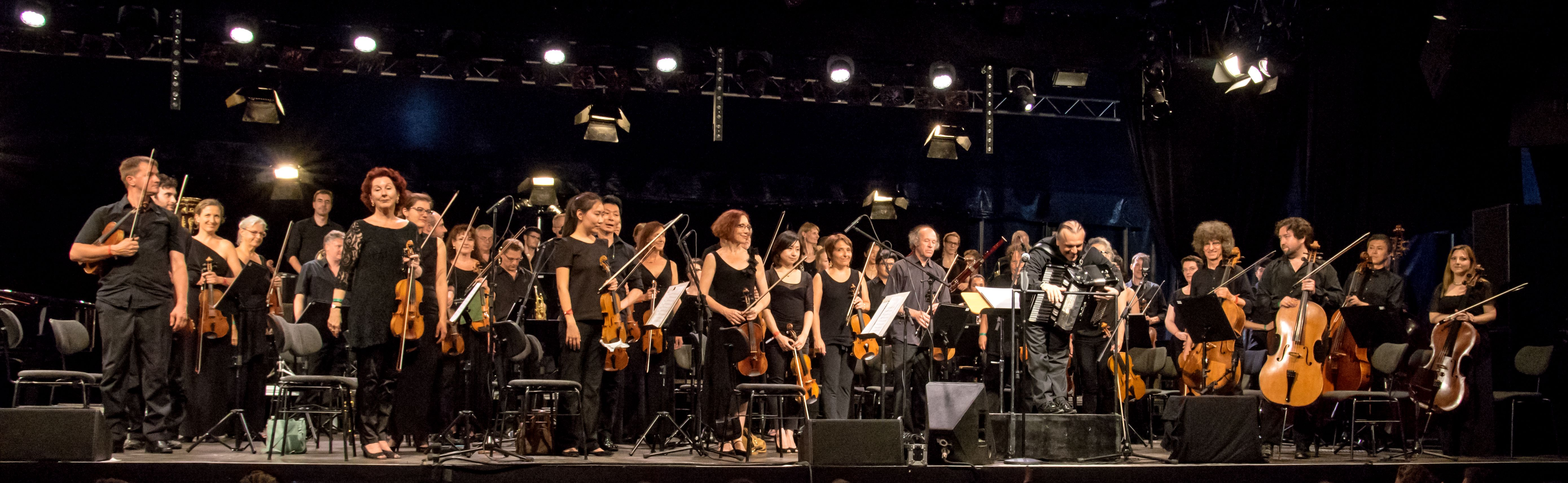 Bilder vom Zelt Musik Festival 2016 in Freiburg im Breisgau Die Gala